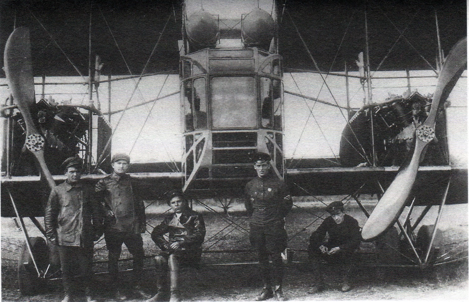 Юго-Западный фронт, 8 сентября 1920 г. Экипаж после налета на аэродроме ст.Федоровка